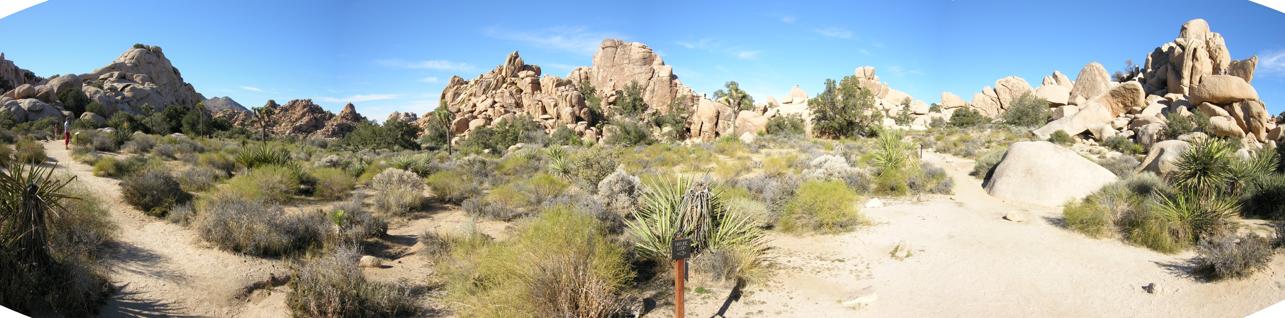 Zelfgemaakt